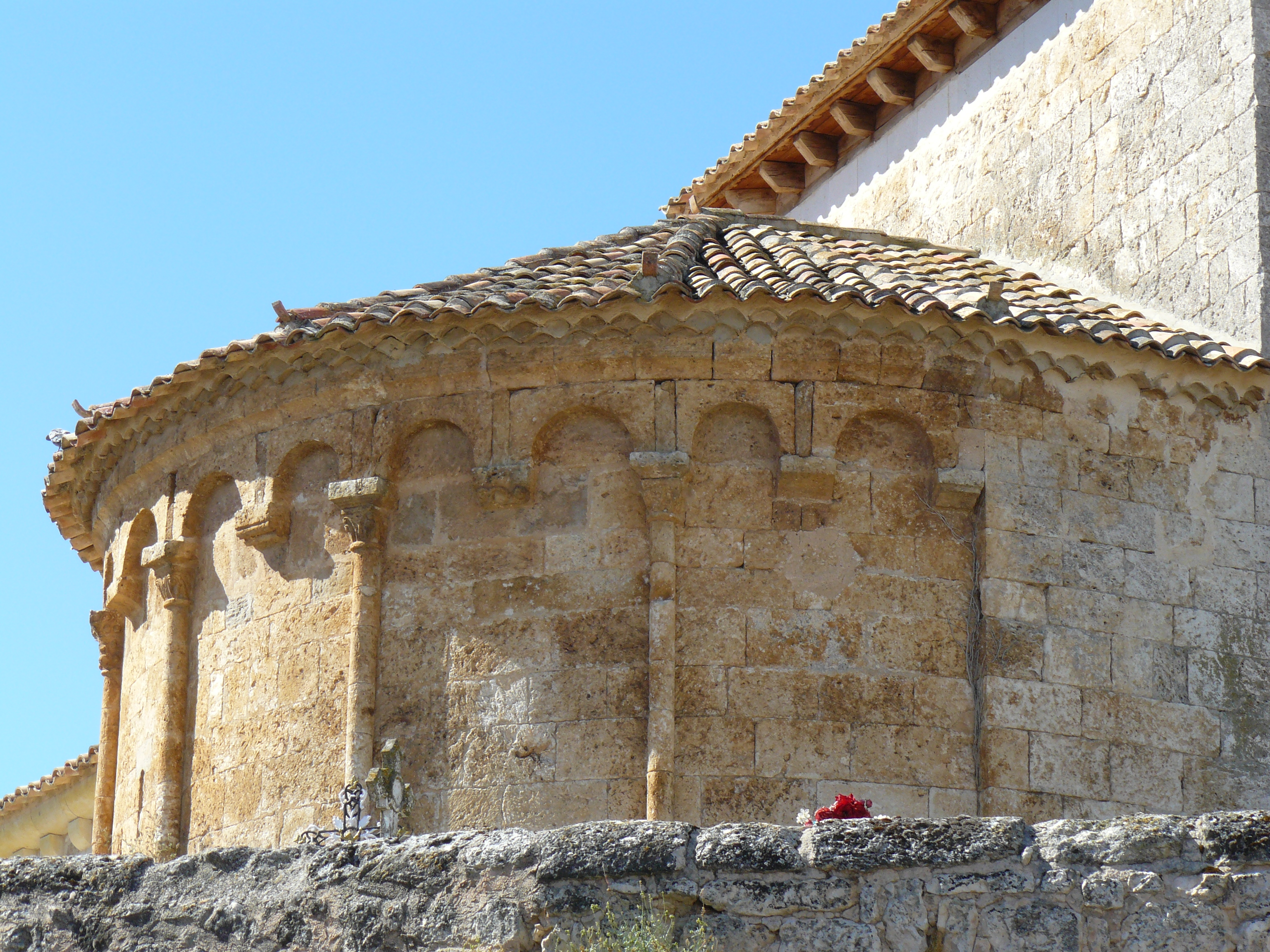 pinillos de Esgueva, Burgos.